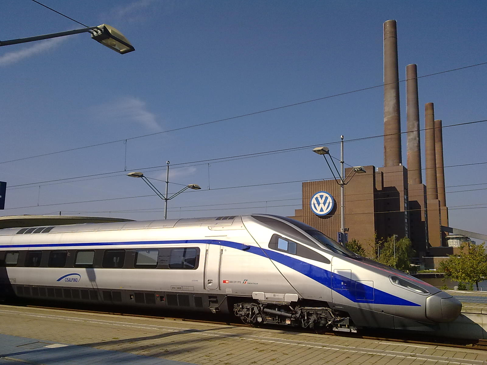 ETR610 vor dem Volkswagen-Kraftwerk in Wolfsburg.